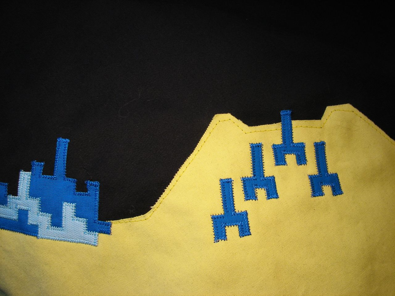 Missile Command Skirt